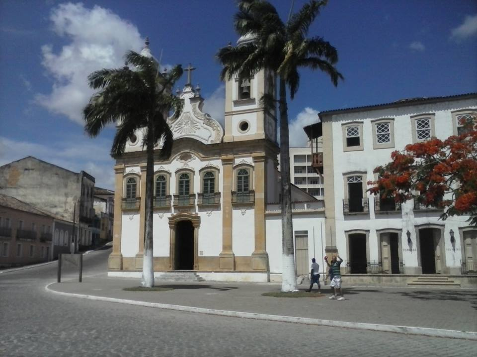 centro de Penedo